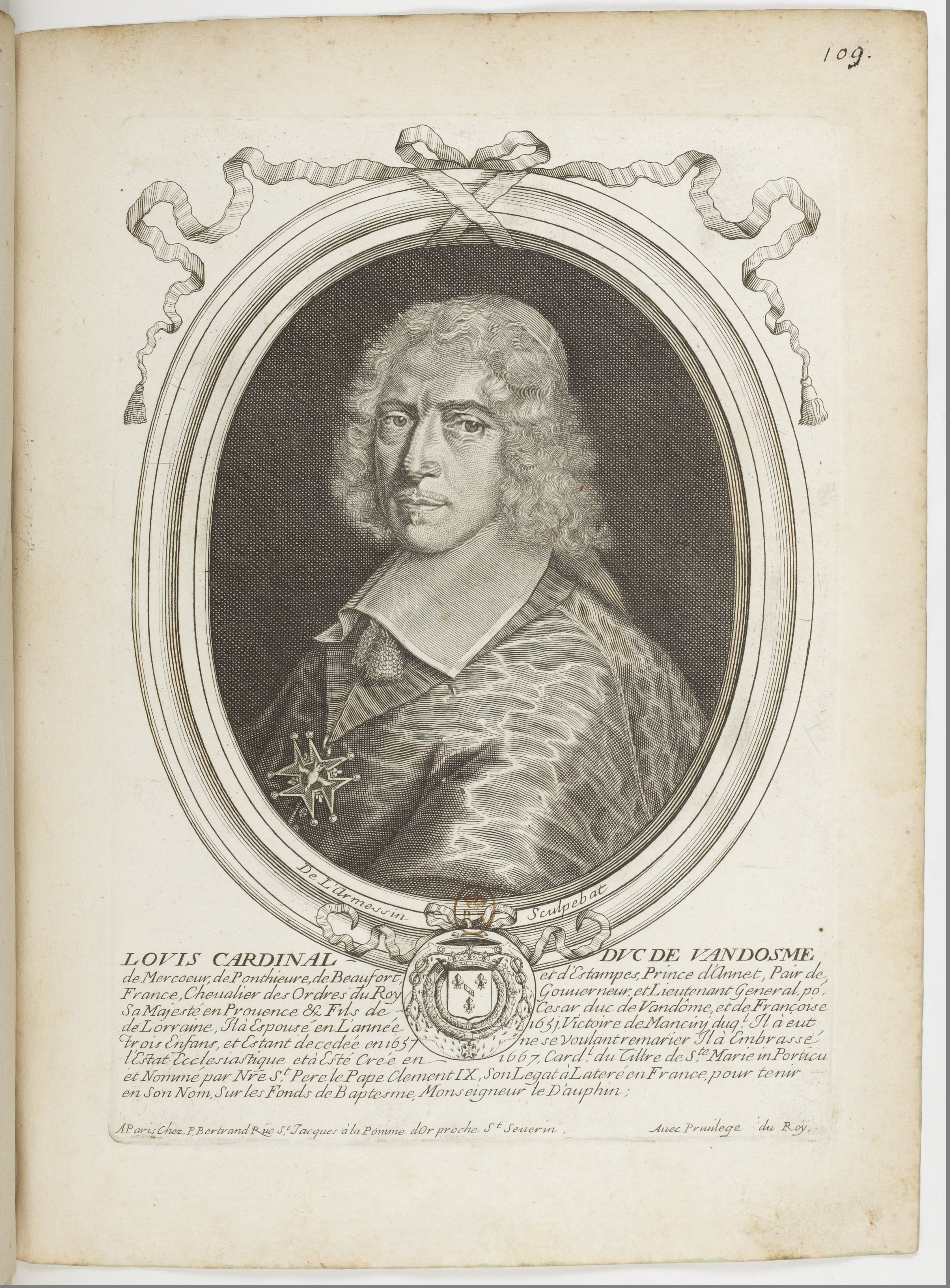 Les augustes représentations de tous les rois de France, depuis Pharamond jusqu'à Louis XIV,... avec un abrégé historique sous chacun, contenant leurs naissances, inclinations et actions plus remarquables pendant leurs règnes